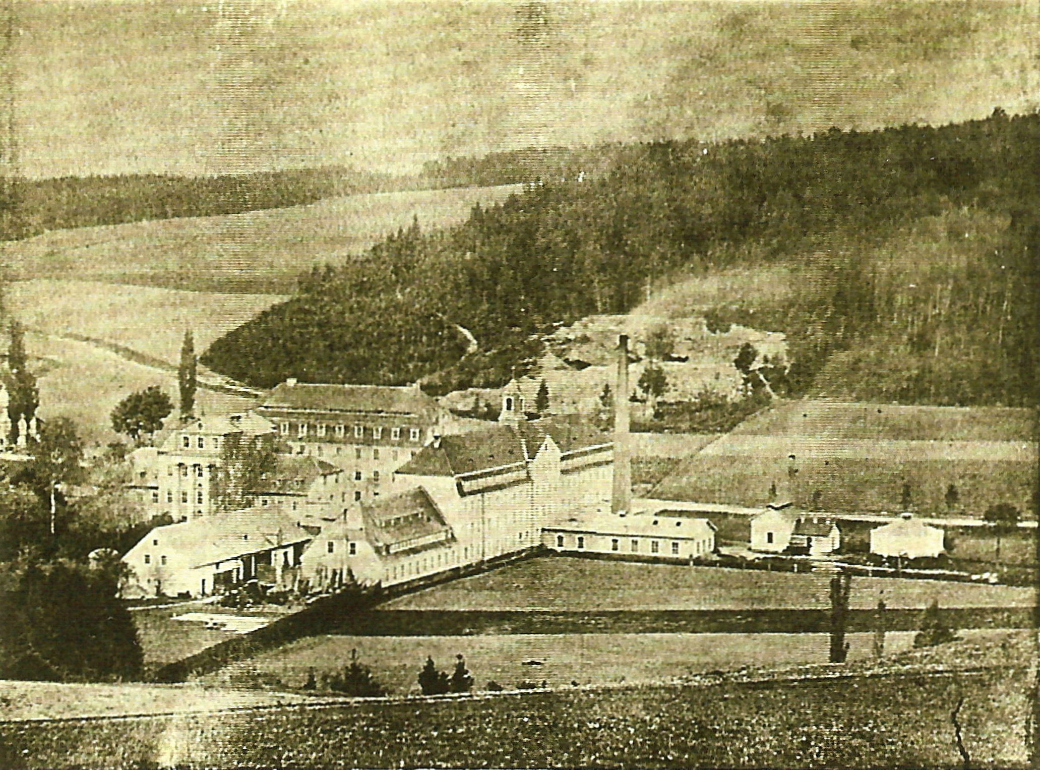 Das Solbrigsche Werk 1867